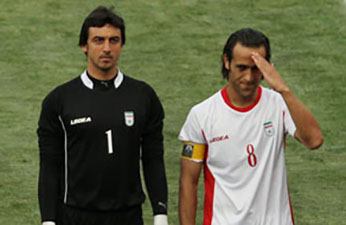 دیدار تدارکاتی تیم های فوتبال ایران و ماداگاسکار / ایران ۱ - ماداگاسکار ۰ / تیر ۱۳۹۰